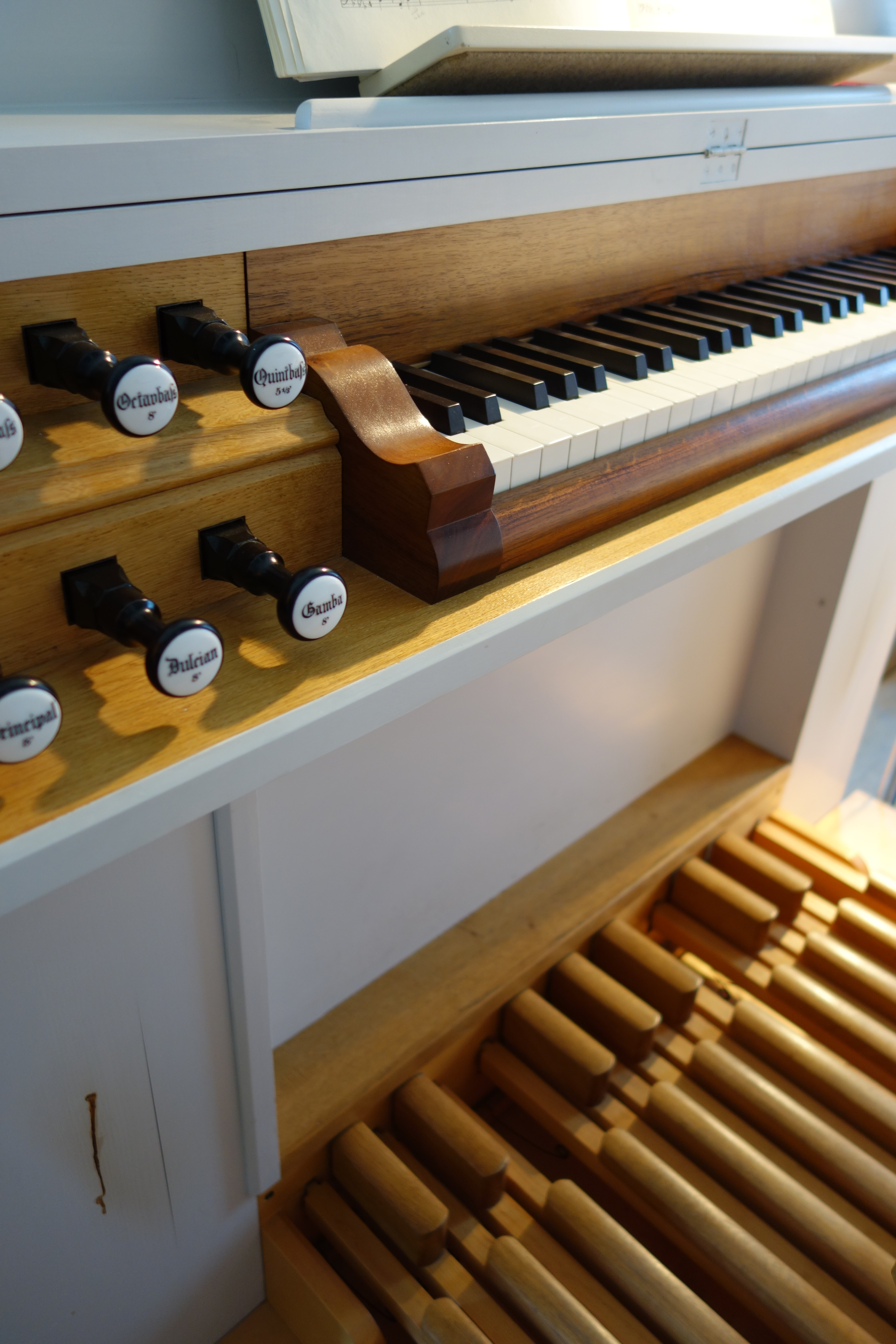 Der rekonstruierte Spieltisch